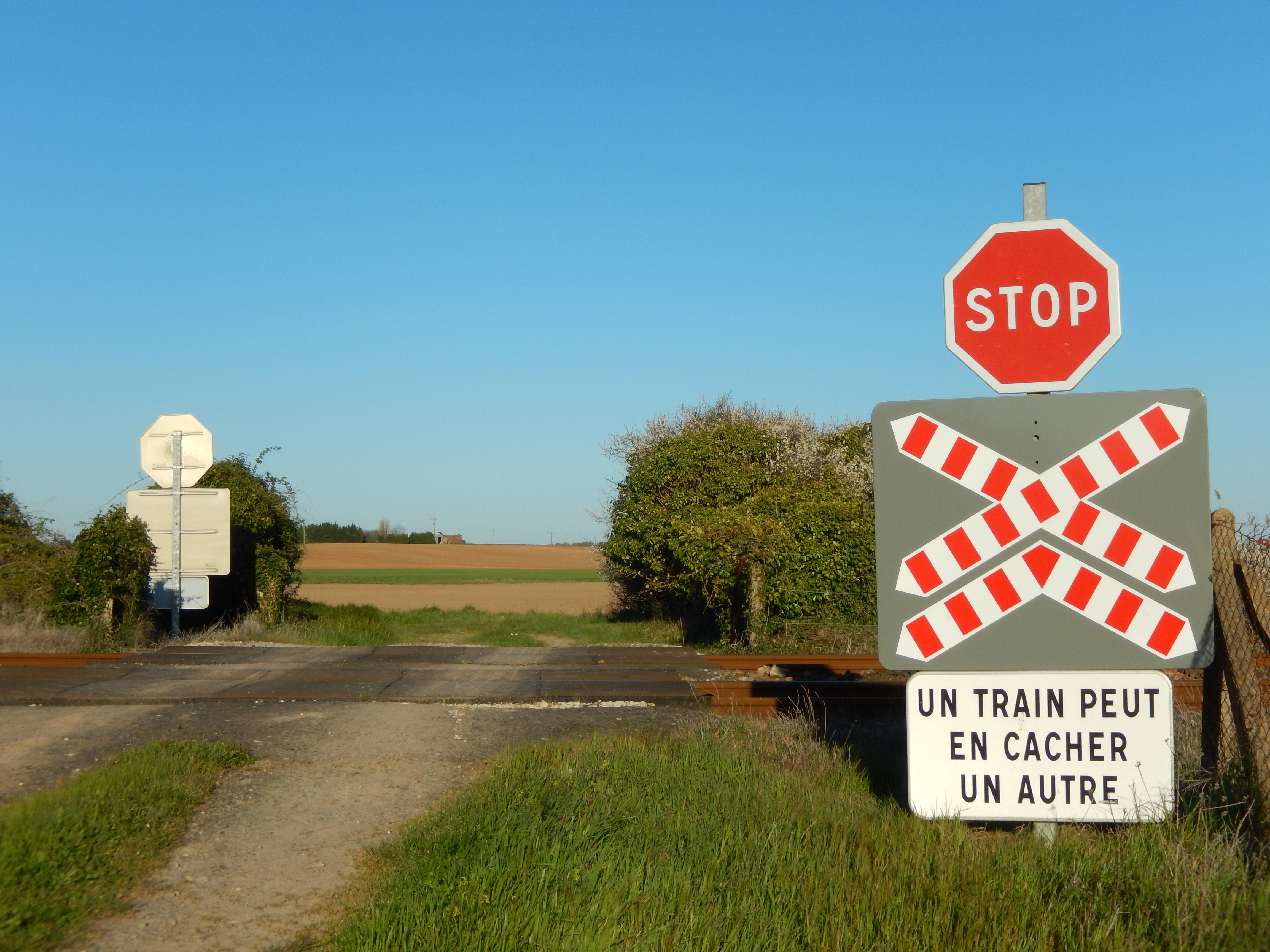 Un panneau AB4, un panneau G1a et un panonceau M9z à hauteur du passage à niveau 182 de la ligne de chemin de fer reliant Nantes à Saintes.